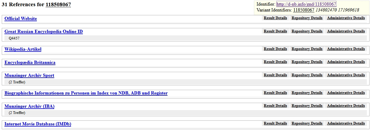 Ausgabe von GND-Quellen mittels BEACON-Technologie